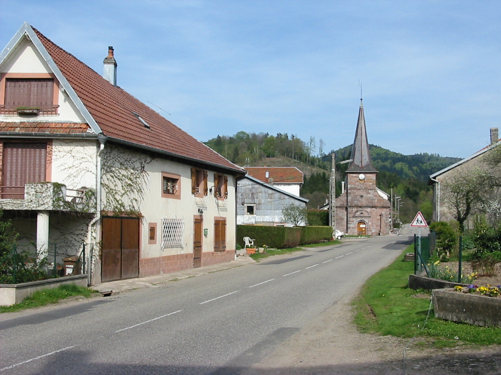 Lubine Commune des Vosges La rue principale Photographie personnelle, prise le 3 mai 2006 Copyright © Christian Amet